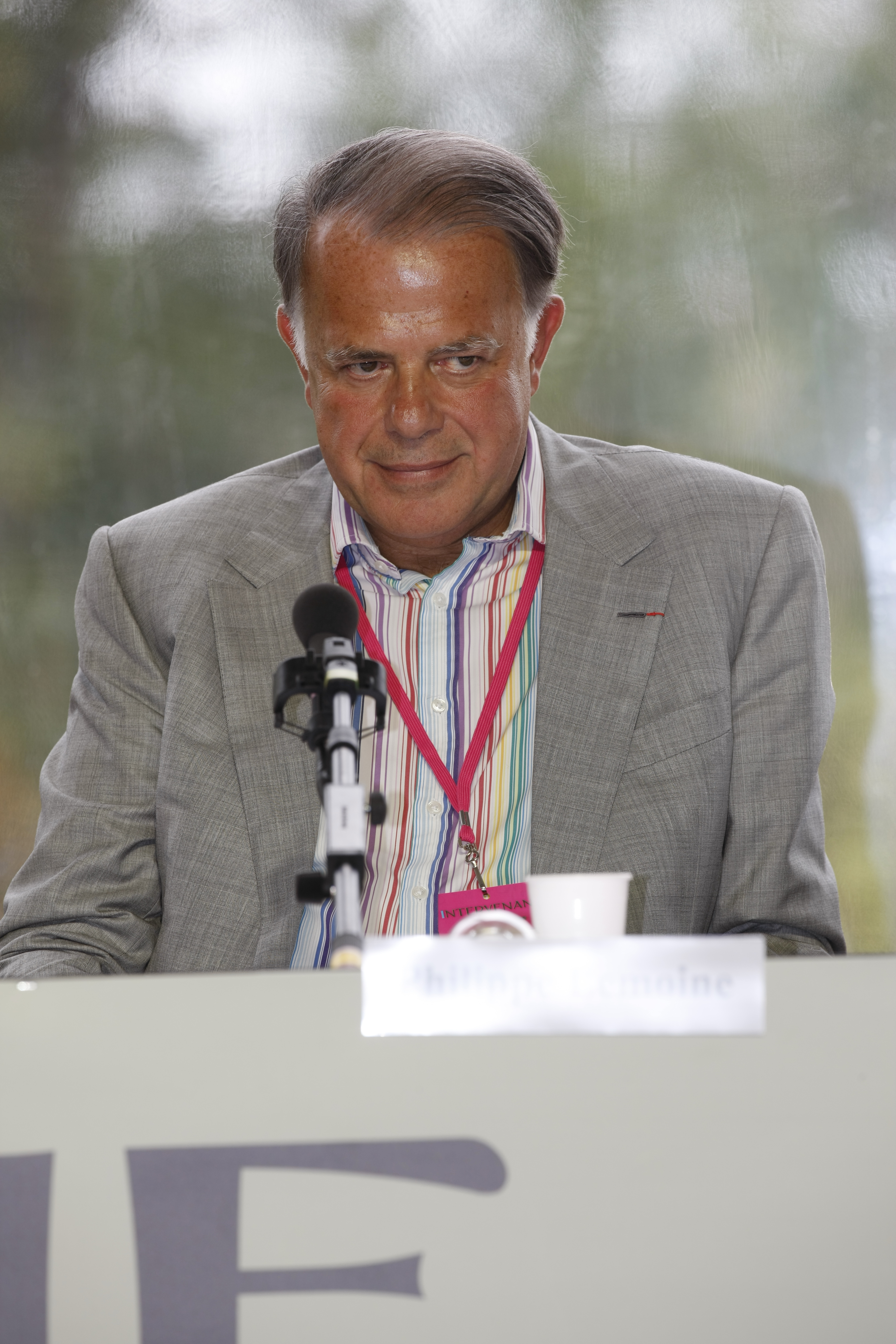 Philippe Lemoine co-président du groupe Galerie Lafayette.